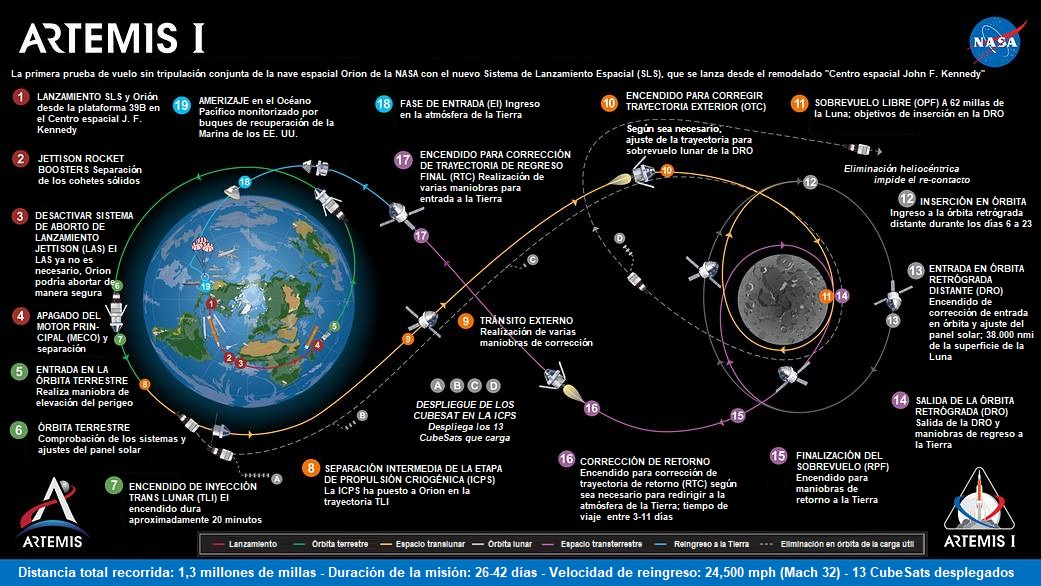 Artemis1 Gráfica de la misión 2019